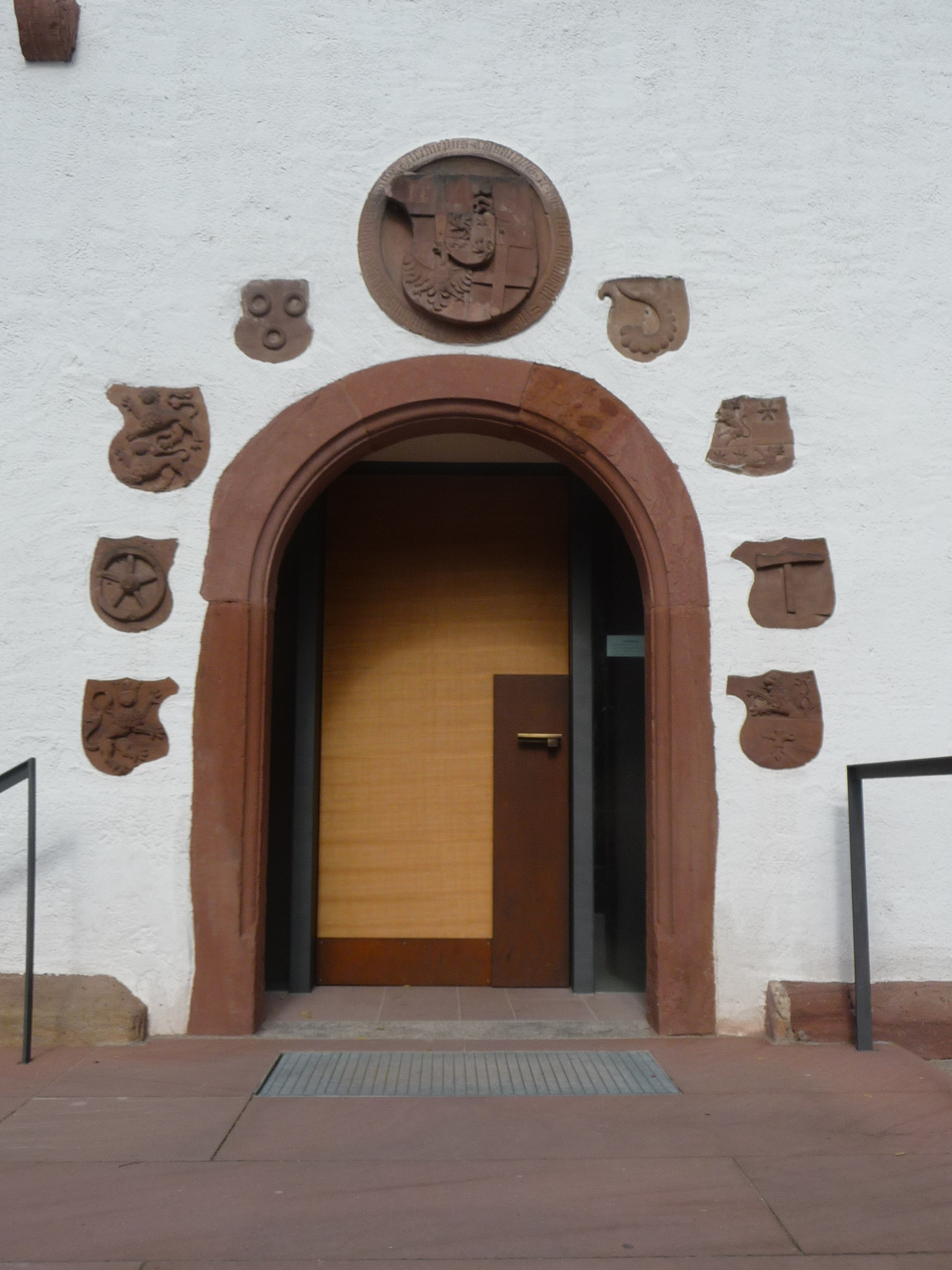 Die Abtei Neuburg (Abtei vom heiligen Bartholomäus) bei Heidelberg, auch als Stift Neuburg und Kloster Neuburg bekannt, ist ein Benediktinerkloster.